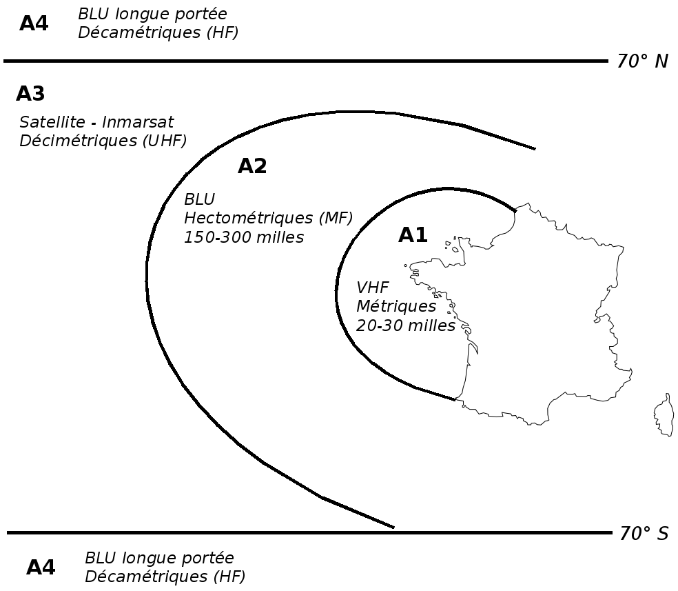 Définition des zones d'exploitation du SMDSM